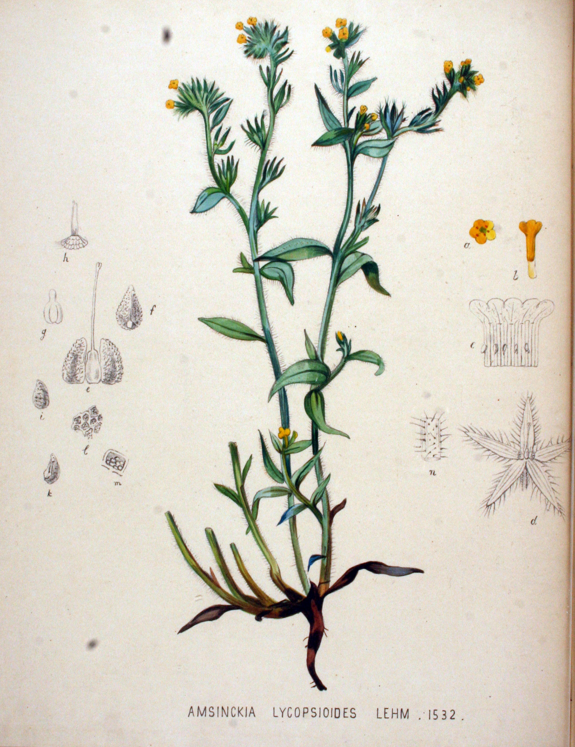 Amsinckia lycopsoides Lehm. ex Fisch. & C.A. Mey.